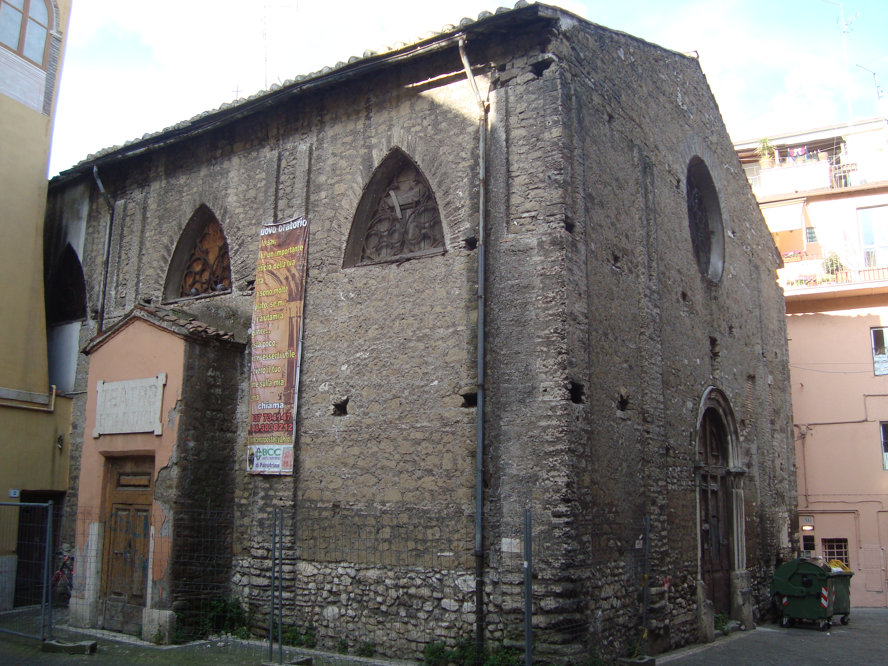 Chevet de l'église San Vincenzo de Tivoli